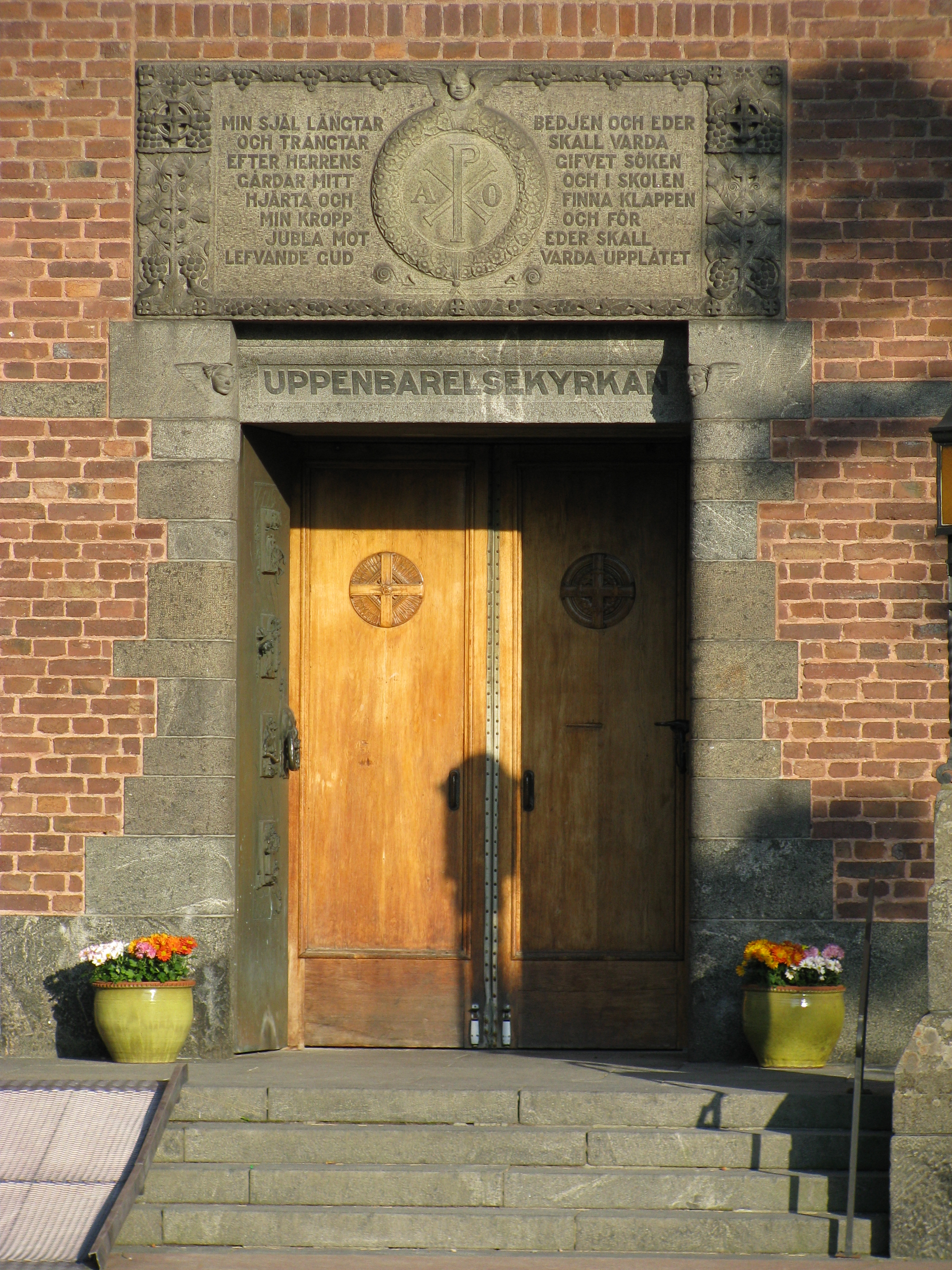 Porten på Uppenbarelsekyrkan i Saltsjöbaden. Källa: eget foto, fotograf EnDumEn 29 september 2008.